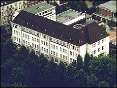 Abendschule im Herzen Hamburgs